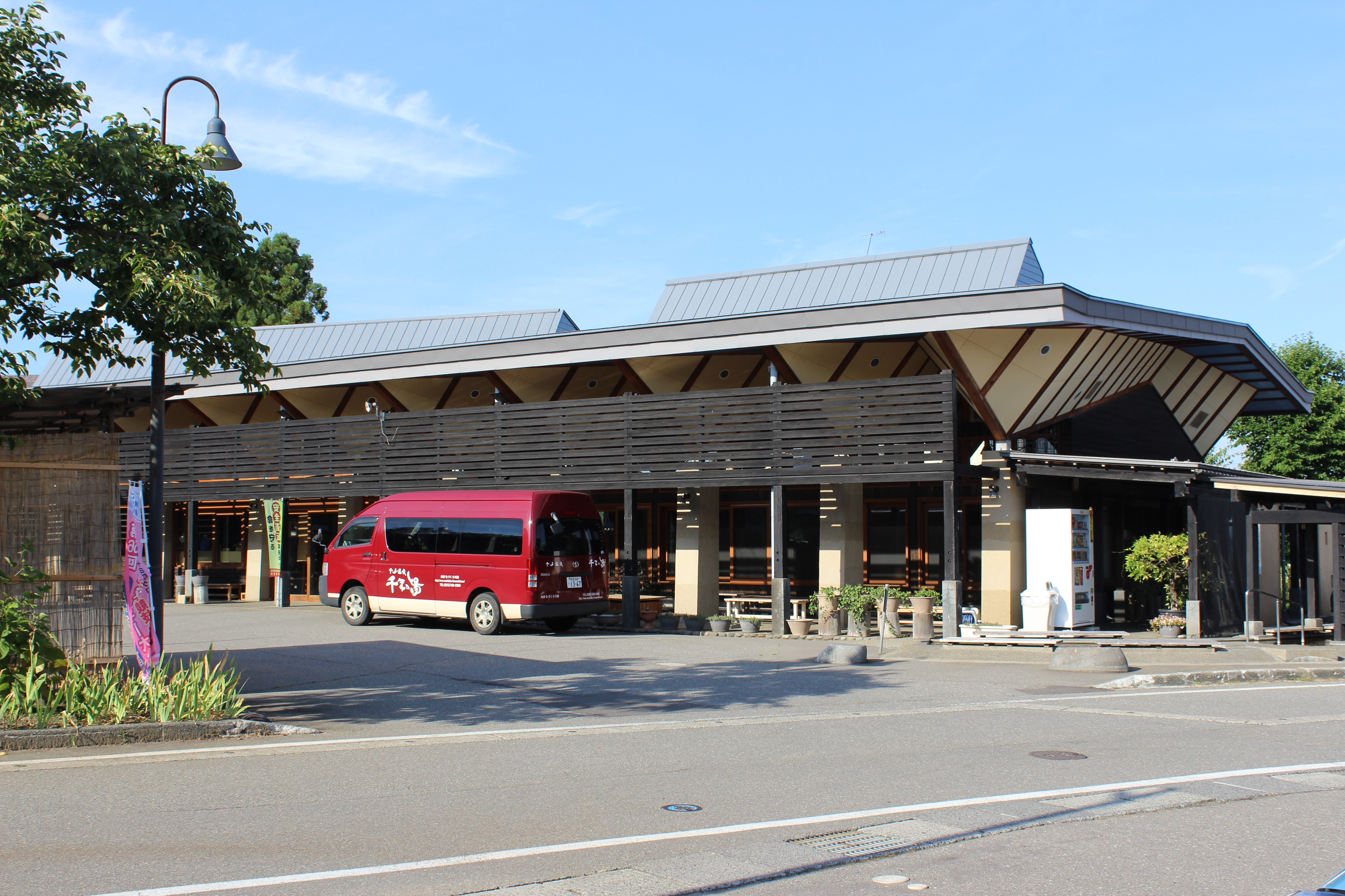 千手温泉 千年の湯（新潟県十日町市水口沢121-7）